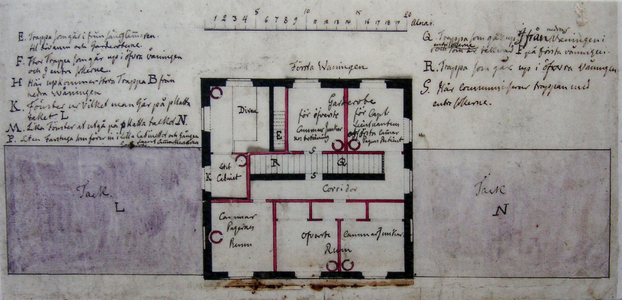 Gustav III. egenhändig skiss för utbyggnaden av Haga slott från 1787.